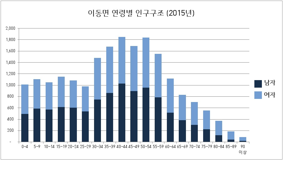 이동면 연령별 인구구조